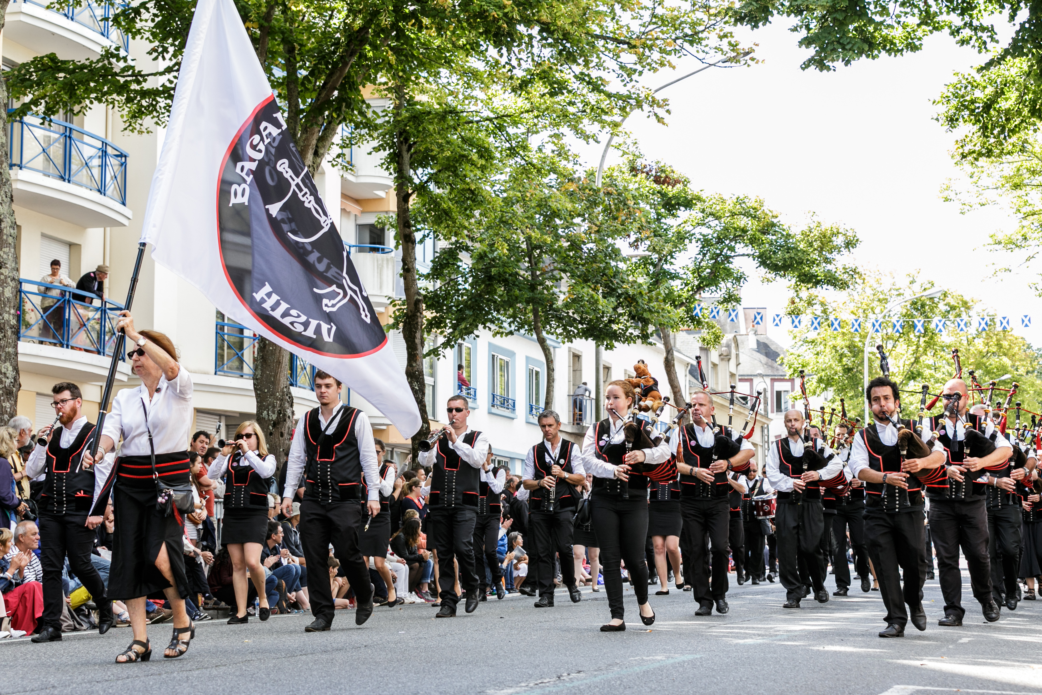 Festival Interceltique de Lorient 2017 - Grande parade des nations celtes - Bagad Hiziv Bro Henbont (Hennebont)